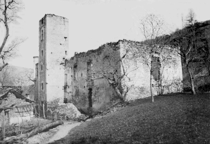 Castello Saint-Marcel prima del restauro (foto precedente al 1941, quando il libro del Nigra era già concluso.)